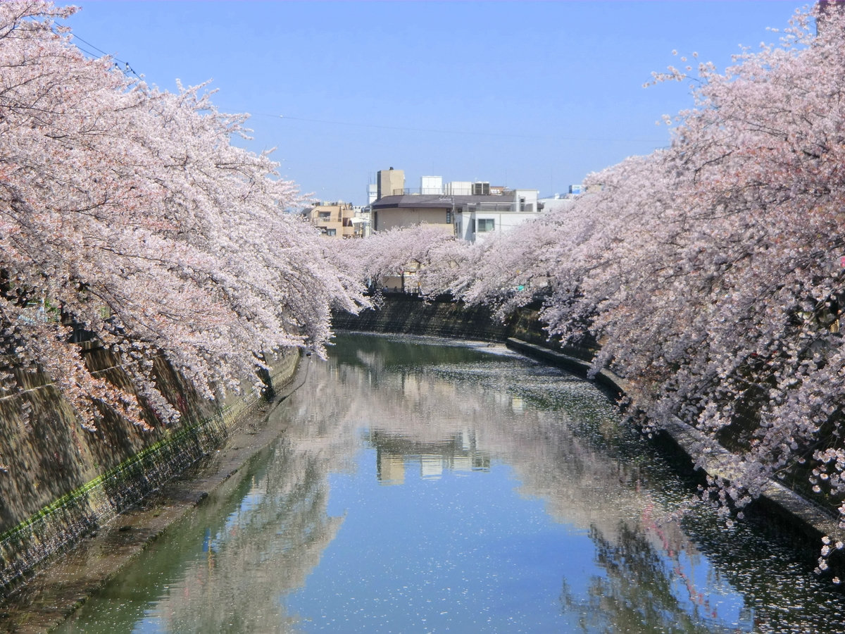 大岡川 大井橋付近